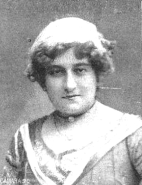 Fotografía de la actriz española María Guerrero publicada cuando su compañía actuaba en el Teatro de la Princesa